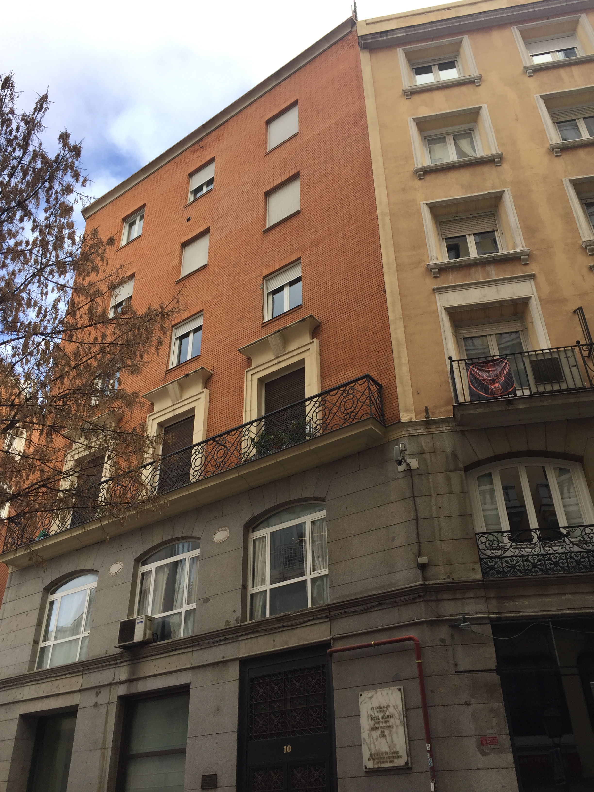 Casa donde vivió José Martí en Madrid, número 10 de la calle Desengaño.